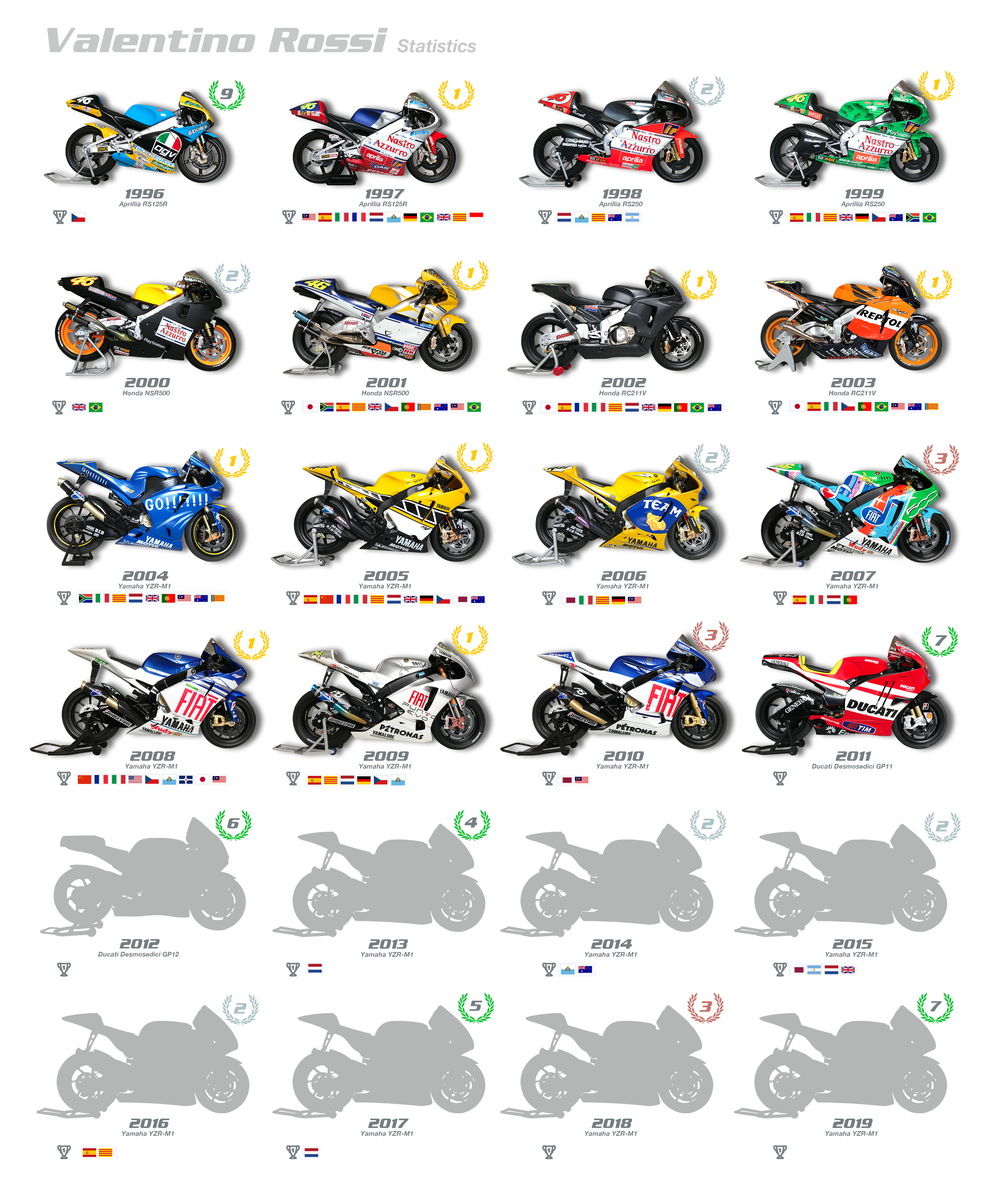 GP-Statistik (Meisterschaft und Einzelsiege) von Valentino Rossi zwischen von 1996 bis 2019 mit Abbildungen seiner Rennbikes, teilweise in Sonder- und Pre-Season-Lackierungen.